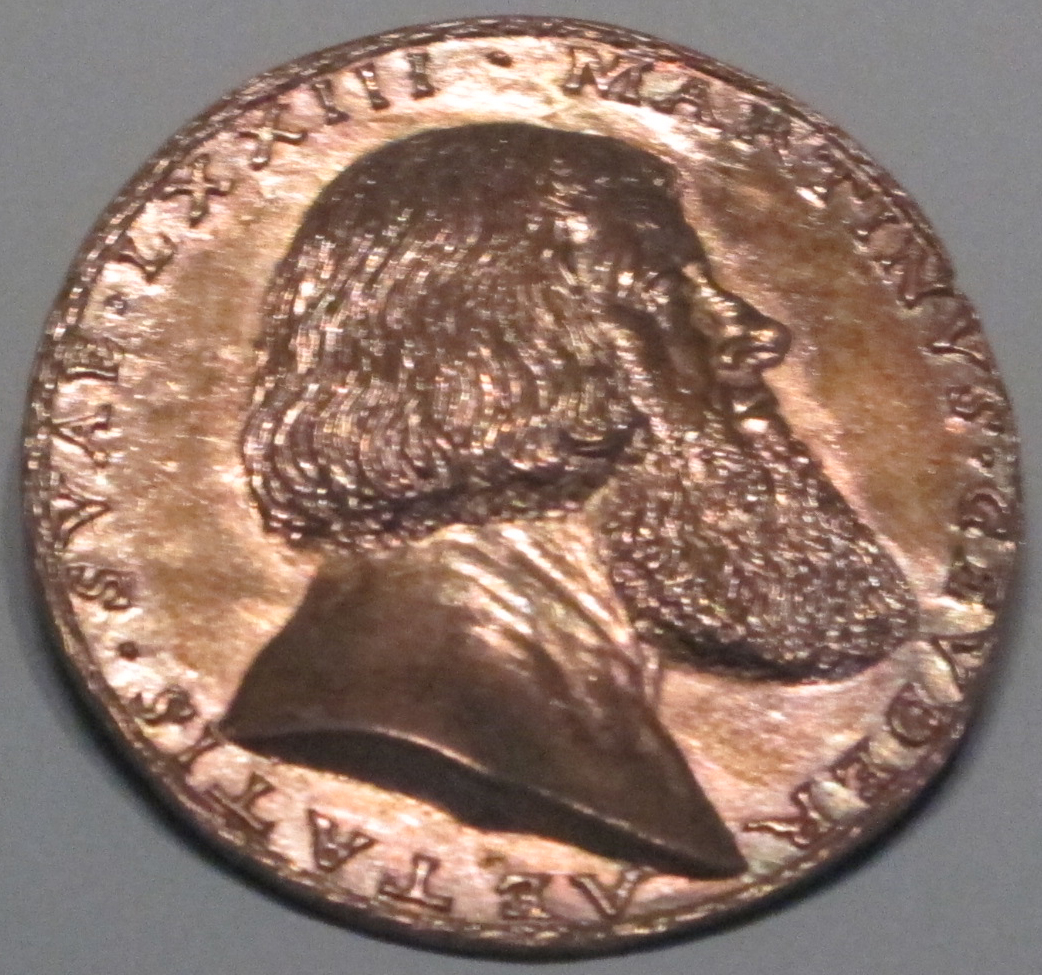 Matthes gebel, med di martin geuder, norimberga 1528